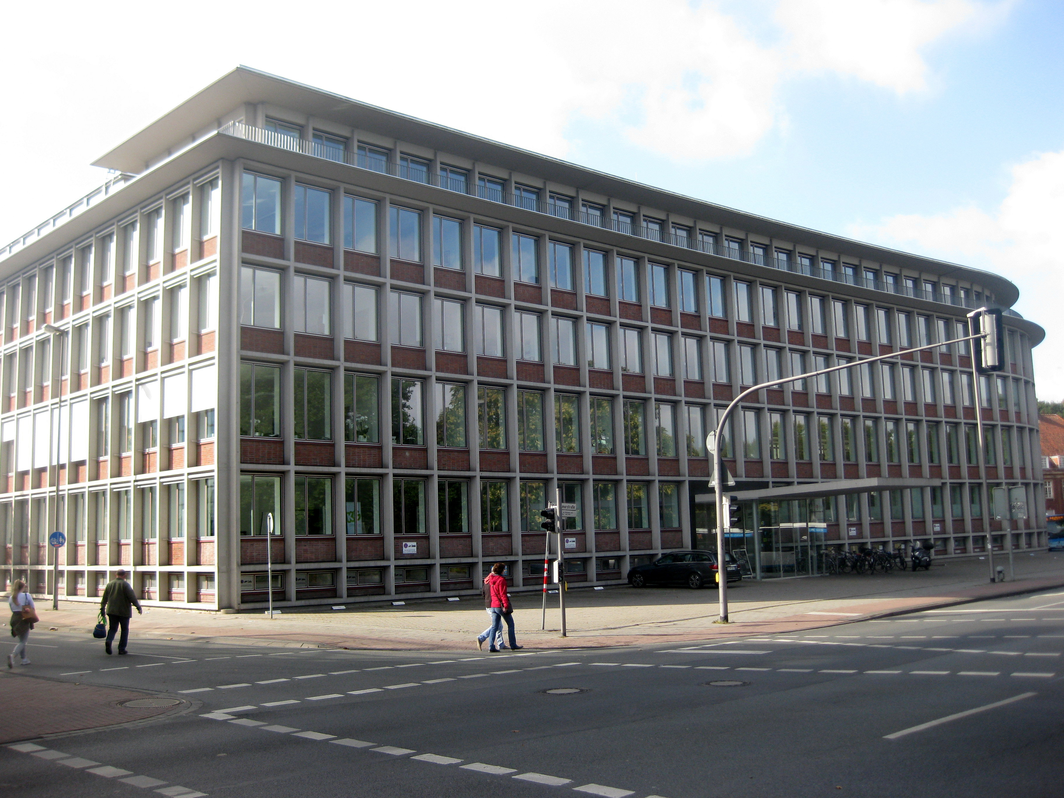 Verwaltungsbau der westdeutschen Nachkriegsmoderne des Berliner Architekten Hardt-Waltherr Hämer, geschwungene Rasterfassade